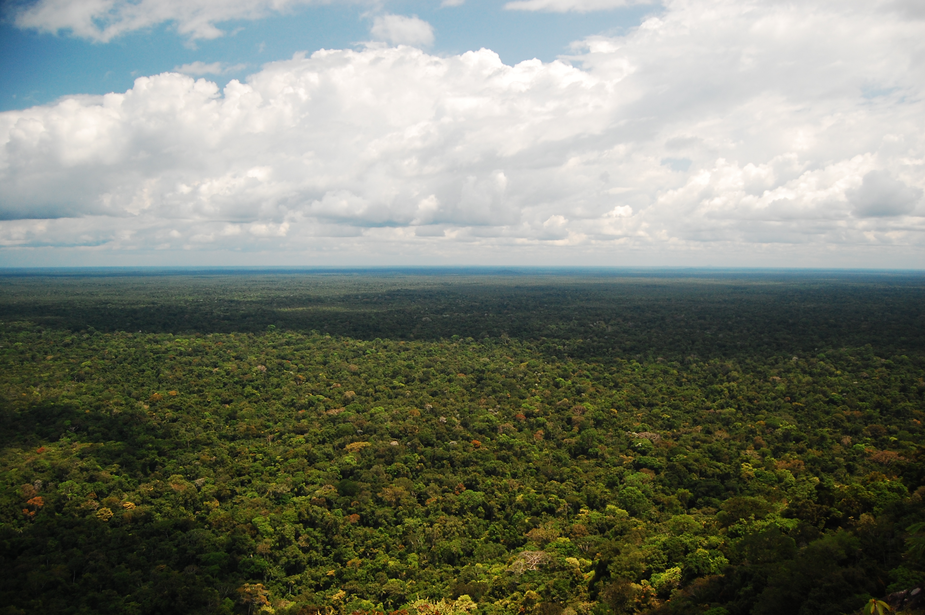 Ao chegar no Topo de qualquer serra ou pico desta região a sensação é inexplicável, o horizonte verde some no infinito.